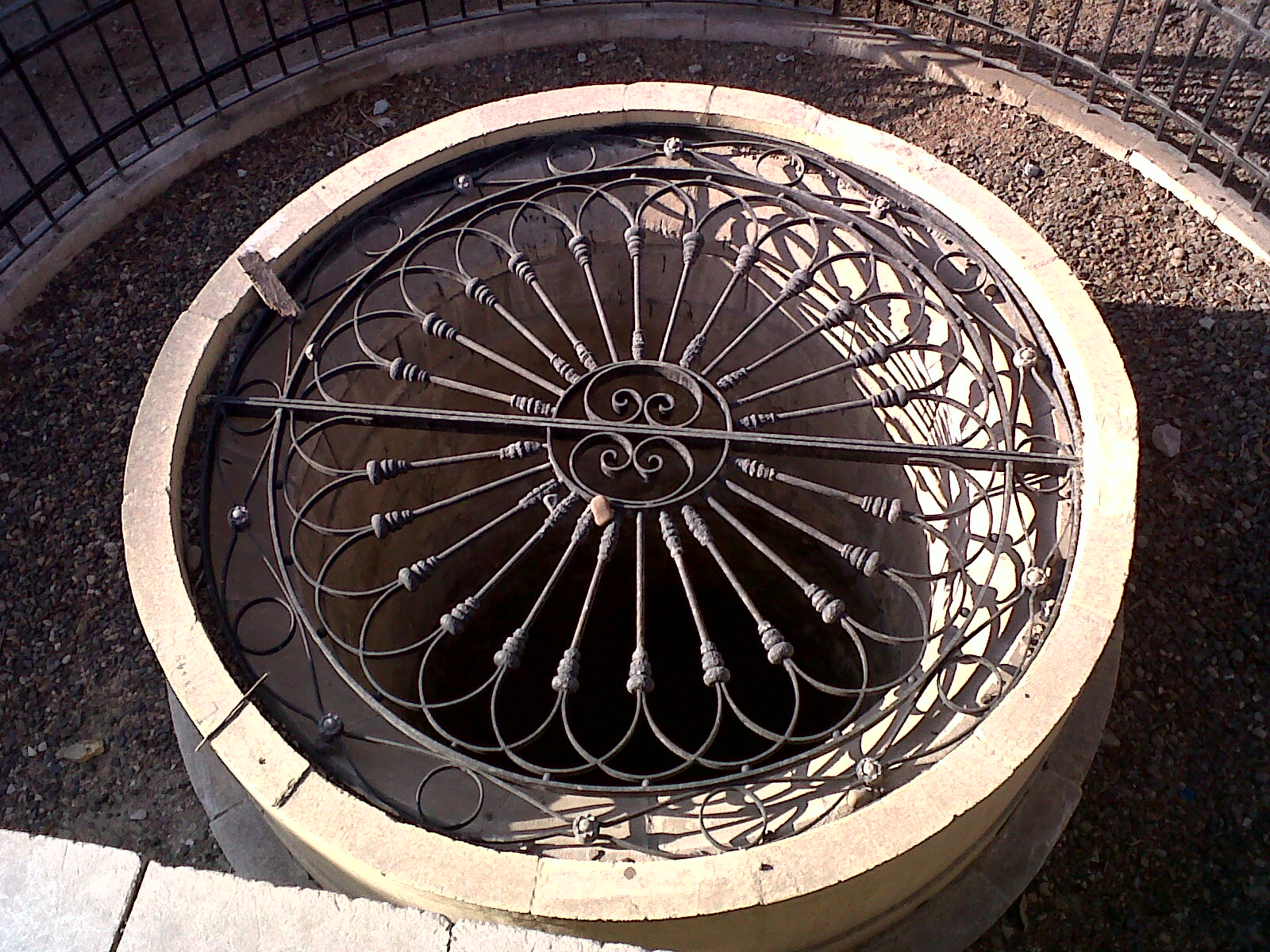 بئر النبي موسى، معبد بن عزرا، القاهرة.